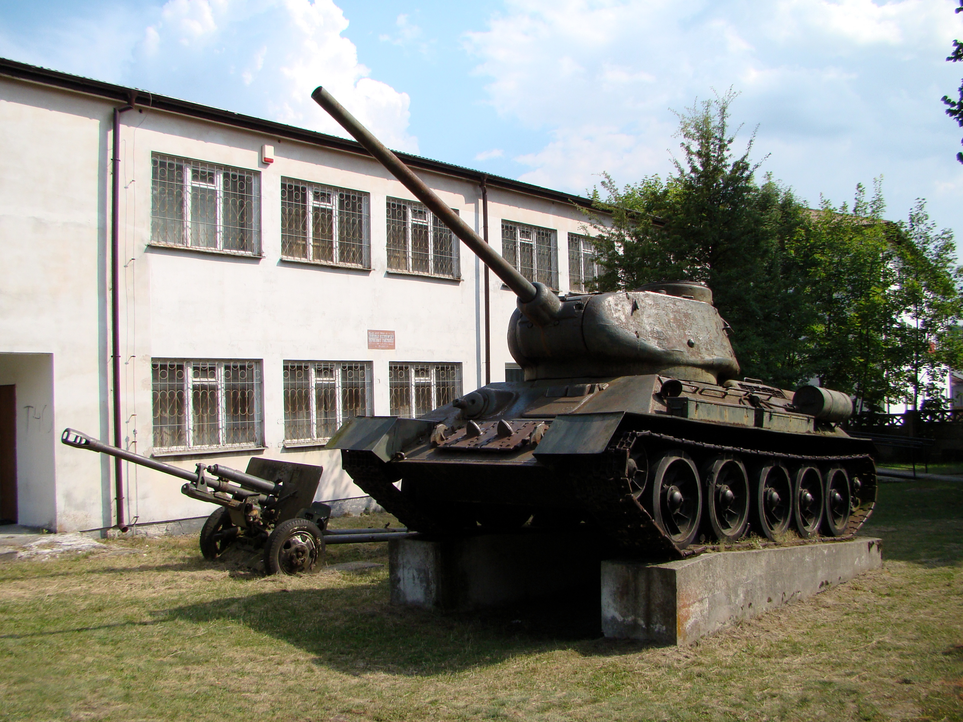 Historické muzeum v obci Bondryź, Polsko